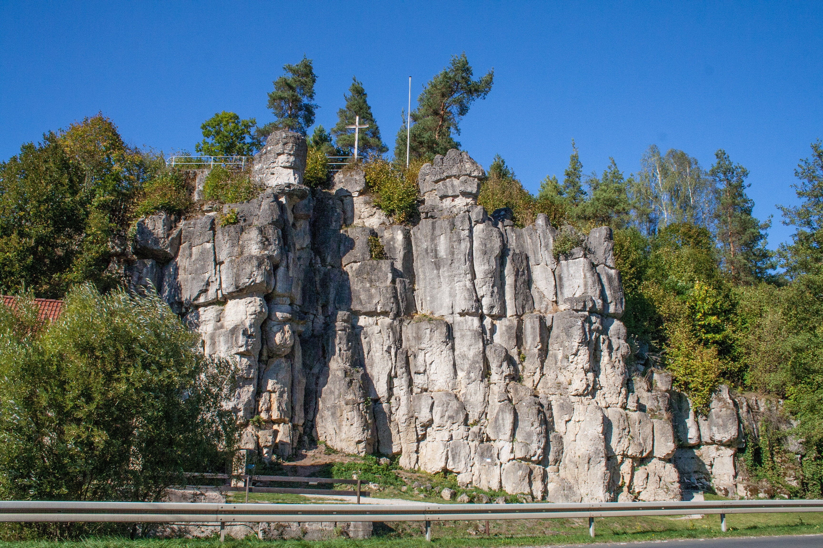 Taschnerfelsen, Aufseß, Geotop